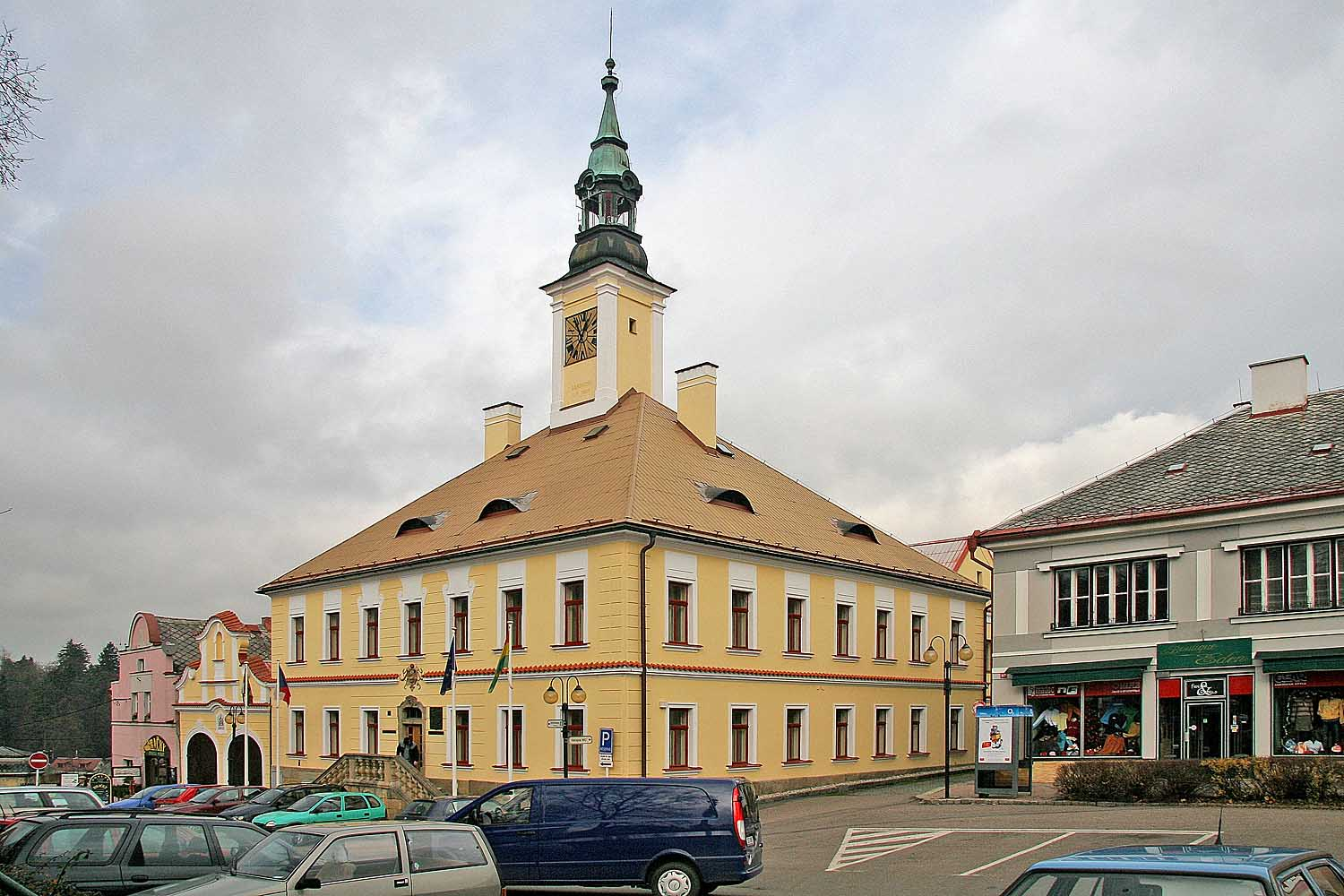 Radnice v Žamberku autor: Prazak date: 21. 11. 2006